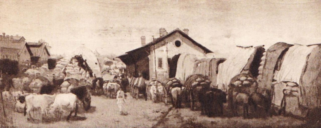 Gara de marfuri - ulei